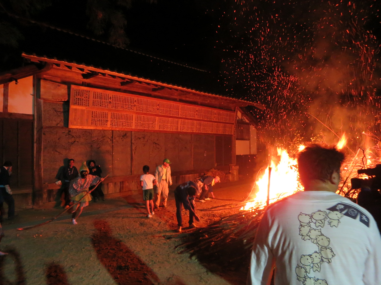 夏山八幡宮火祭り（岡崎市夏山町）